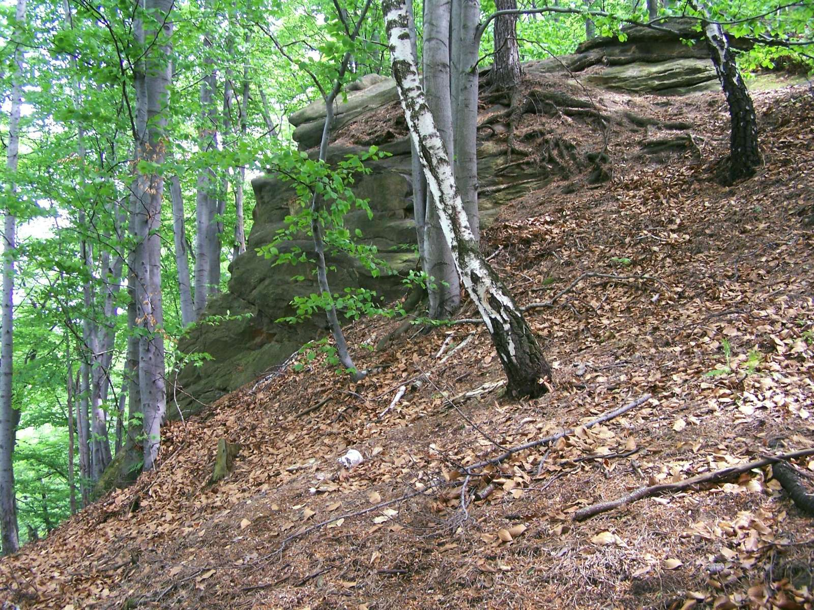 Diabelski kamień w Trzcianie (Libichowa na granicy z Cichawką)